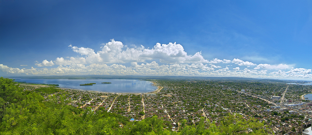 Ciénaga de La Virgen y sector sur de Cartagena vistos desde el salto del Cabrón